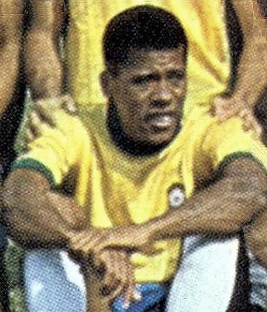 Dadá Maravilha (1970), 'Mexico 70', Panini figurina.